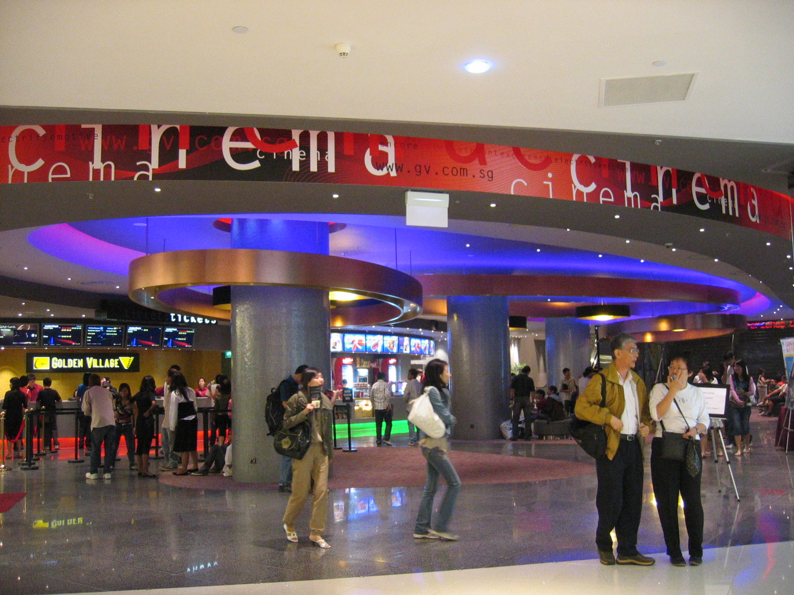 Golden Village VivoCity, Singapore.